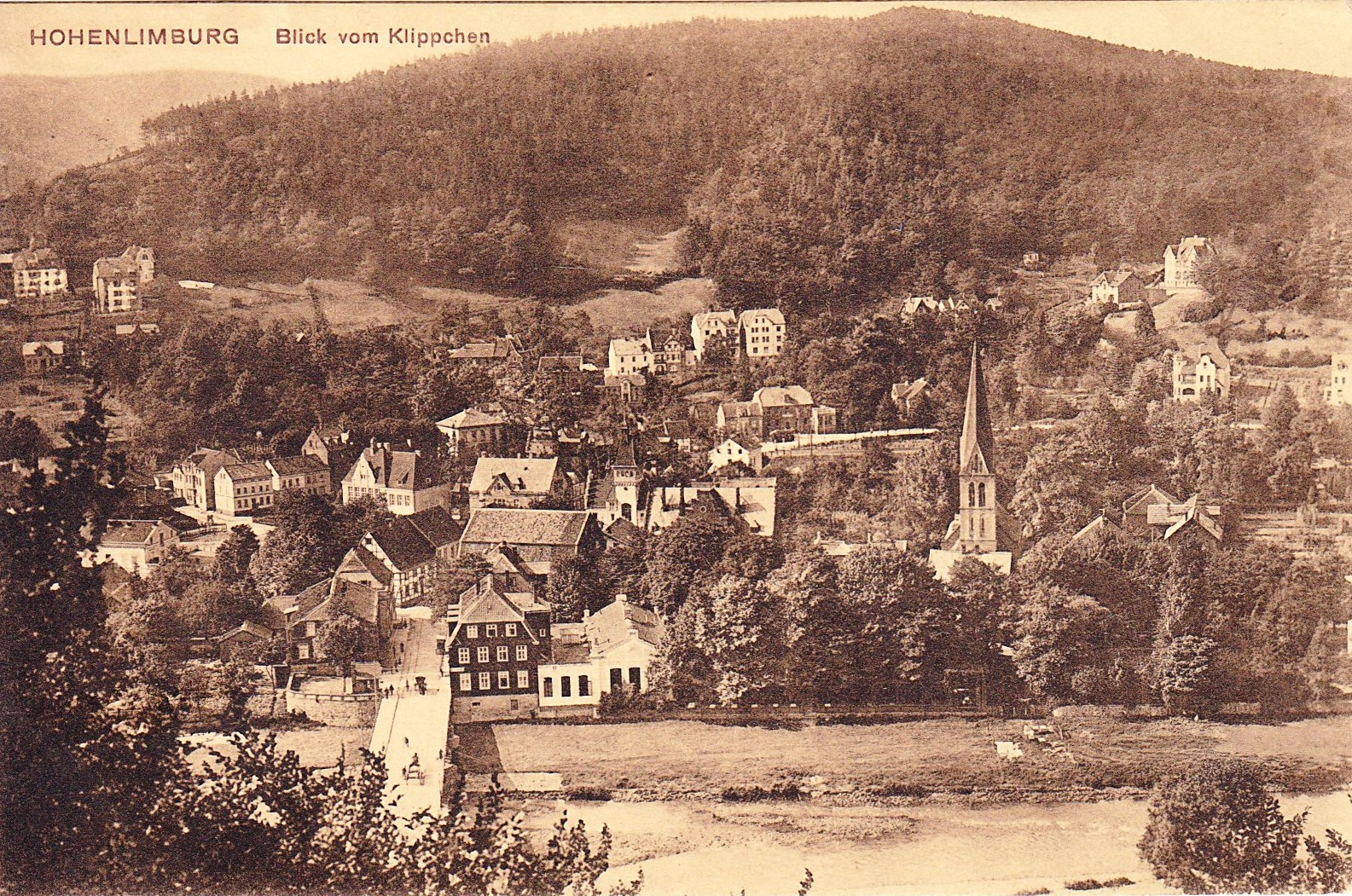 Hohenlimburg Blick vom Klippchen. Postkarte von 1911. – Aussicht vom Möllerdenkmal am Klippchen auf den Bentheimer Hof (noch verschiefert und mit Saalbau) an der Lennebrücke. Dort wird von einem Wachposten gerade Brückenzoll erhoben. Darüber sieht man das große Dach vom Rathaus, dem gegenüber an der Kreuzung zur Freiheitstraße das Fachwerkhaus „Gasthof zur Post“; erste Poststelle Limburgs (1786 Posthalter Polscher). Rechts hinter dem Rathaus das Gesundheitsamt (mit Turm), weiter rechts „Im Weinhof“ das Dach vom Amtsgericht, die katholische Bonifatius Kirche und Weinhofschule. Darüber hinter der Bahnstrecke die Hagener Chaussee mit dem Gasthof Möller und oberhalb schon einige Häuser „An der Kehle“ und „Raffenbergstraße“. Ganz links am Berghang die ersten Häuser an der Eggestraße (heute Boeingstraße).